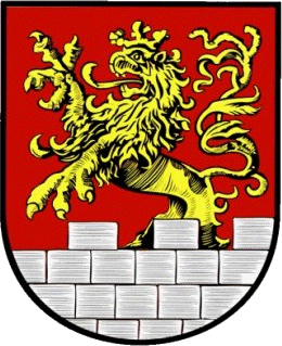 Wappen der Gemeinde Vasoldsberg in Österreich